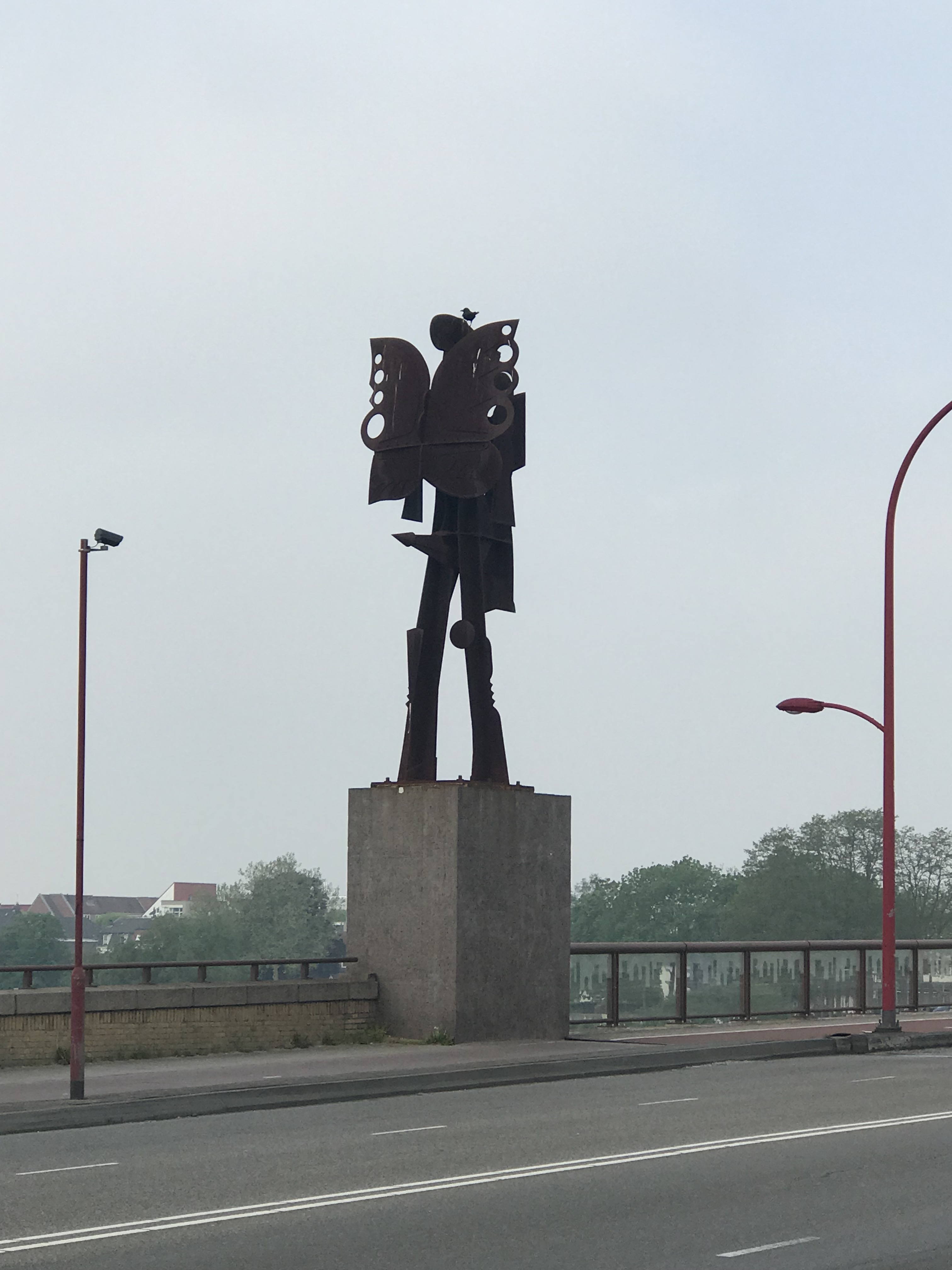 Een gietijzer beeld van ongeveer 9 meter hoog inclusief sokkel.